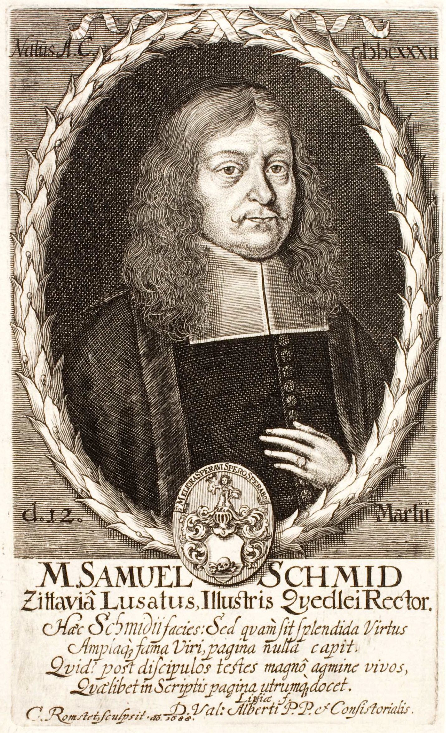 Portrait Samuel Schmid (mit Wappen)